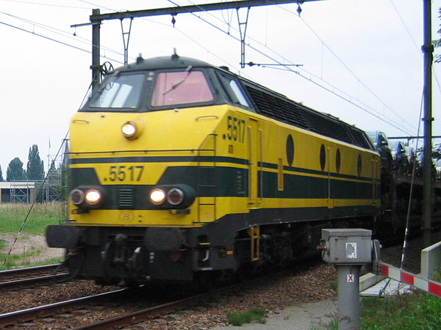 Class 55 locomotief 5517 trekt de Ford-trein tussen Ford Genk en de Sloehaven (Vlissingen, NL), ter hoogte van de Vloeiende in Kapellen.